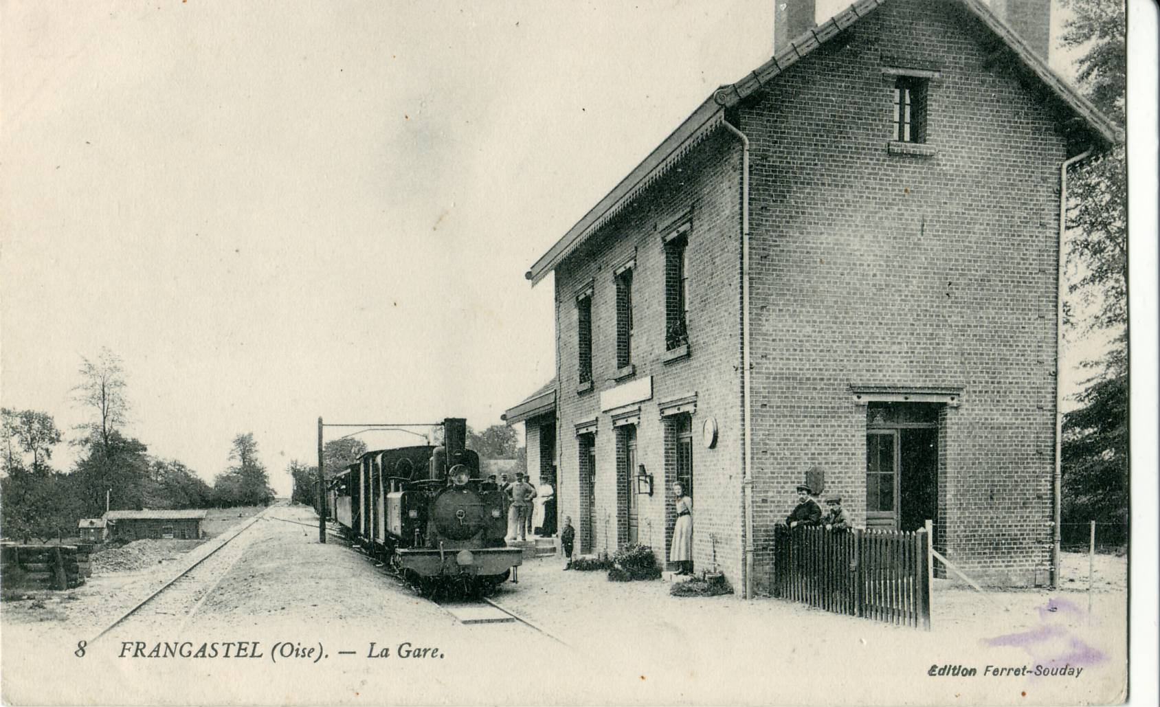 Carte postale ancienne éditée par Ferret-Souday N°8 FRANCASTEL - La Gare (Ligne Estrées-Saint-Denis - Froissy - Crèvecœur-le-Grand)